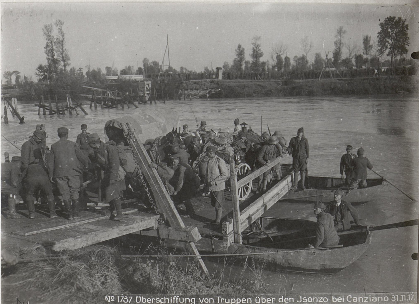 Überschiffung von Truppen über den Jsonzo bei Canziano 31.11.17.